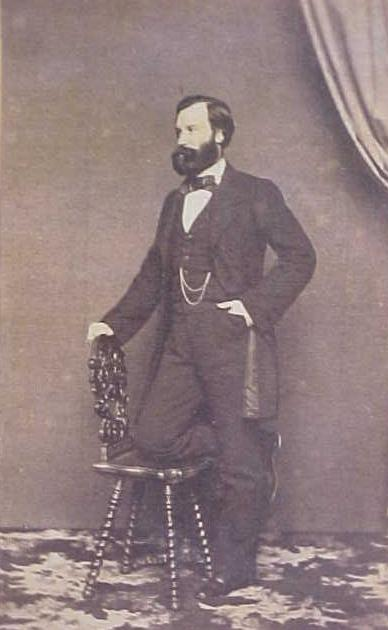 Conde de Wilson - Fotografia do sÃ©culo XIX - Original da ColeÃ§Ã£o Waldyr Cordovil Pires - Rio de Janeiro